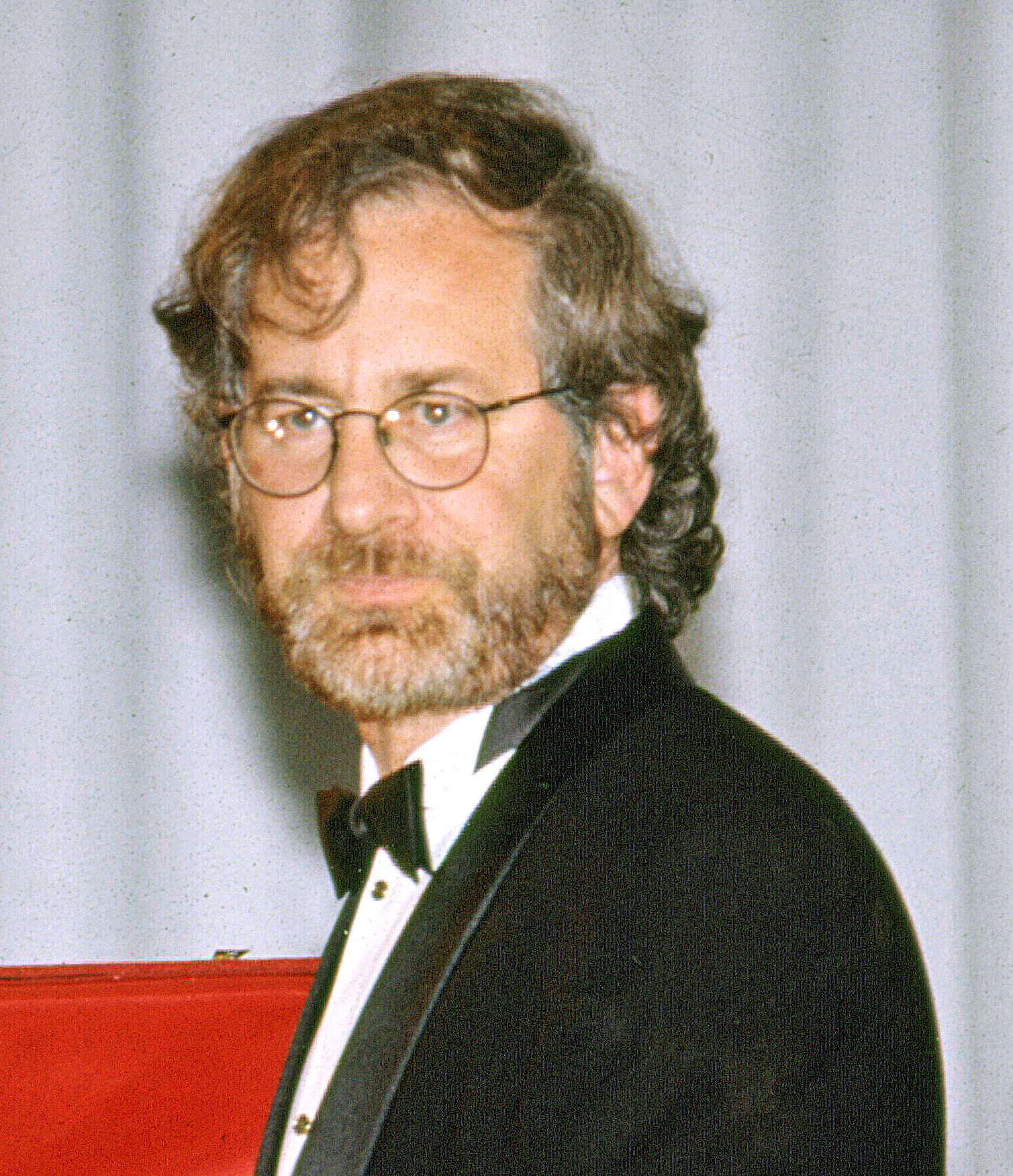 Steven Spielberg alla Mostra del Cinema a Venezia